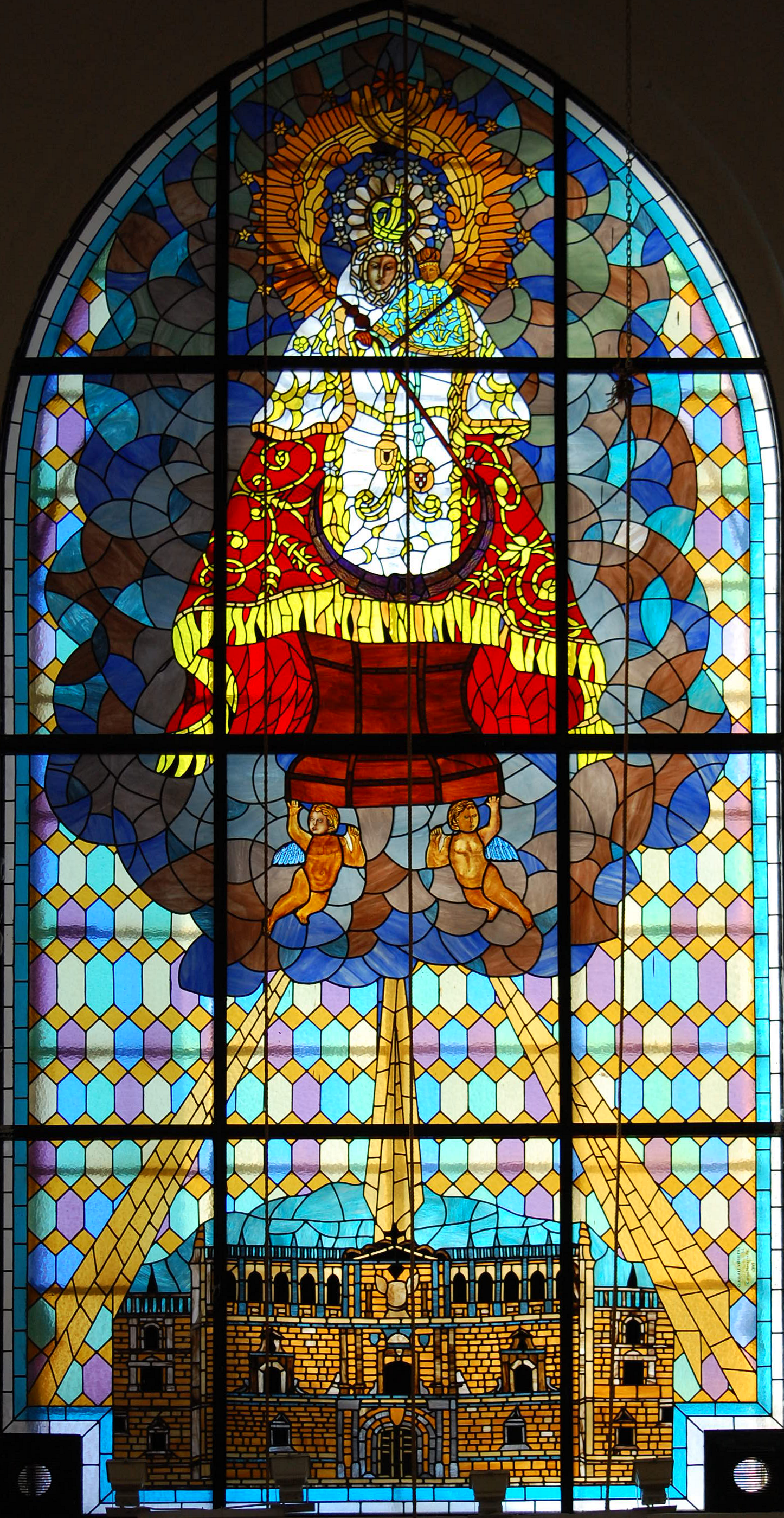 Vidriera policromada de la Ermita de Nuestra Señora del Val en Alcalá de Henares; representando a la Virgen del Val y, a sus pies, la fachada del Colegio Mayor de San Ildefonso. Carlos Manzanedo, 1999.